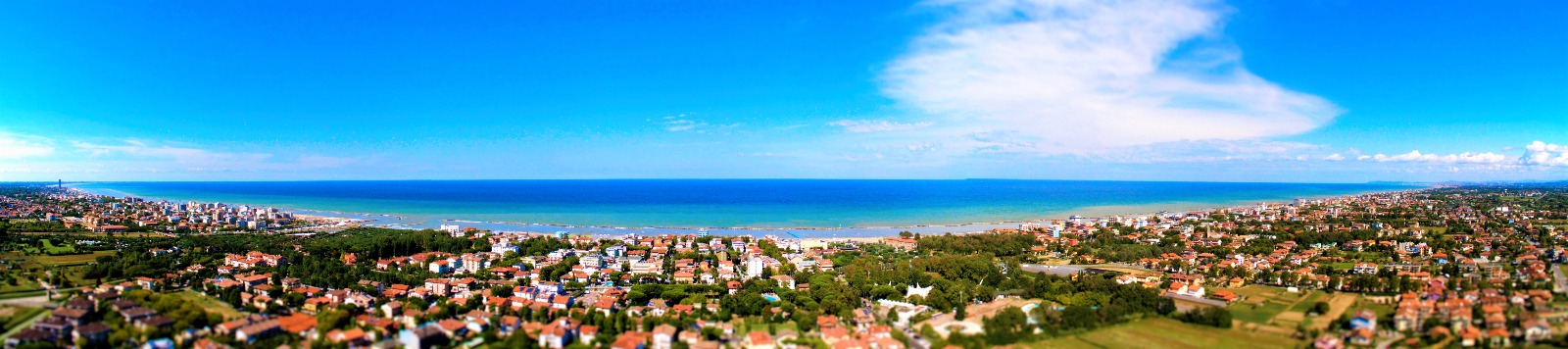 Panoramica San Mauro a Mare